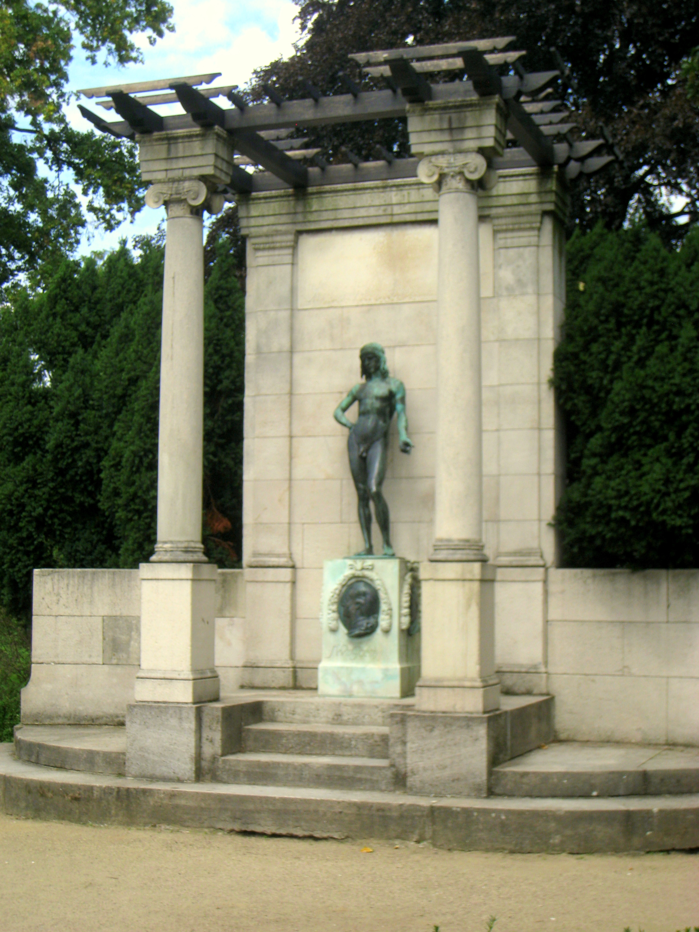 Goethe-Denkmal in the Herrngarten park, Darmstadt, Germany.